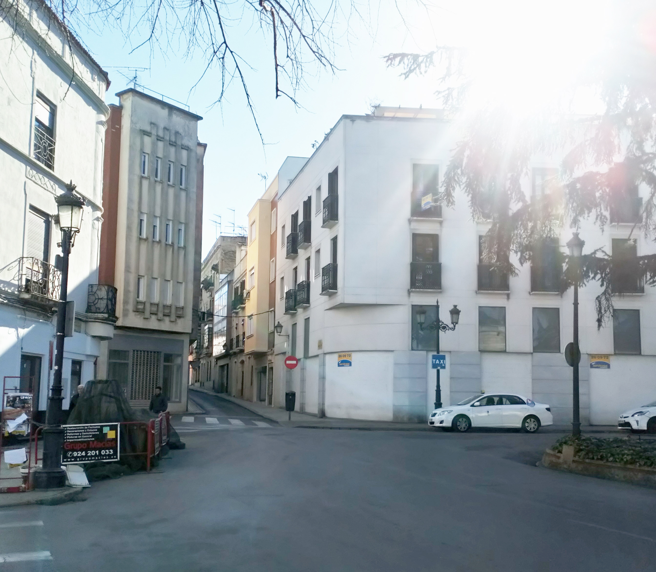 Badajoz. Imagen actual de la confluencia de la Plaza Reyes Católicos, conocida con anterioridad como "Campo de la Cruz" o "Alameda Vieja", con la calle José "de Gabriel" Estenoz.